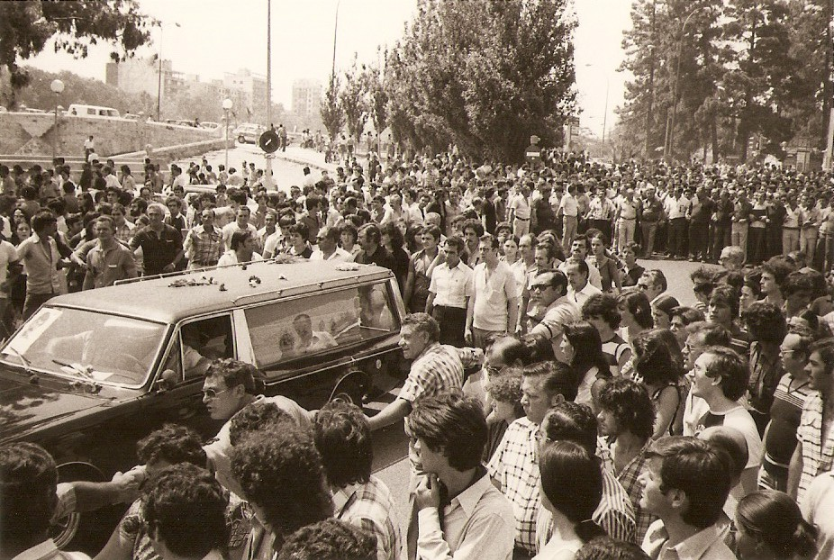 Vista del coche funebre con los familiares, detras una masiva manifestación.